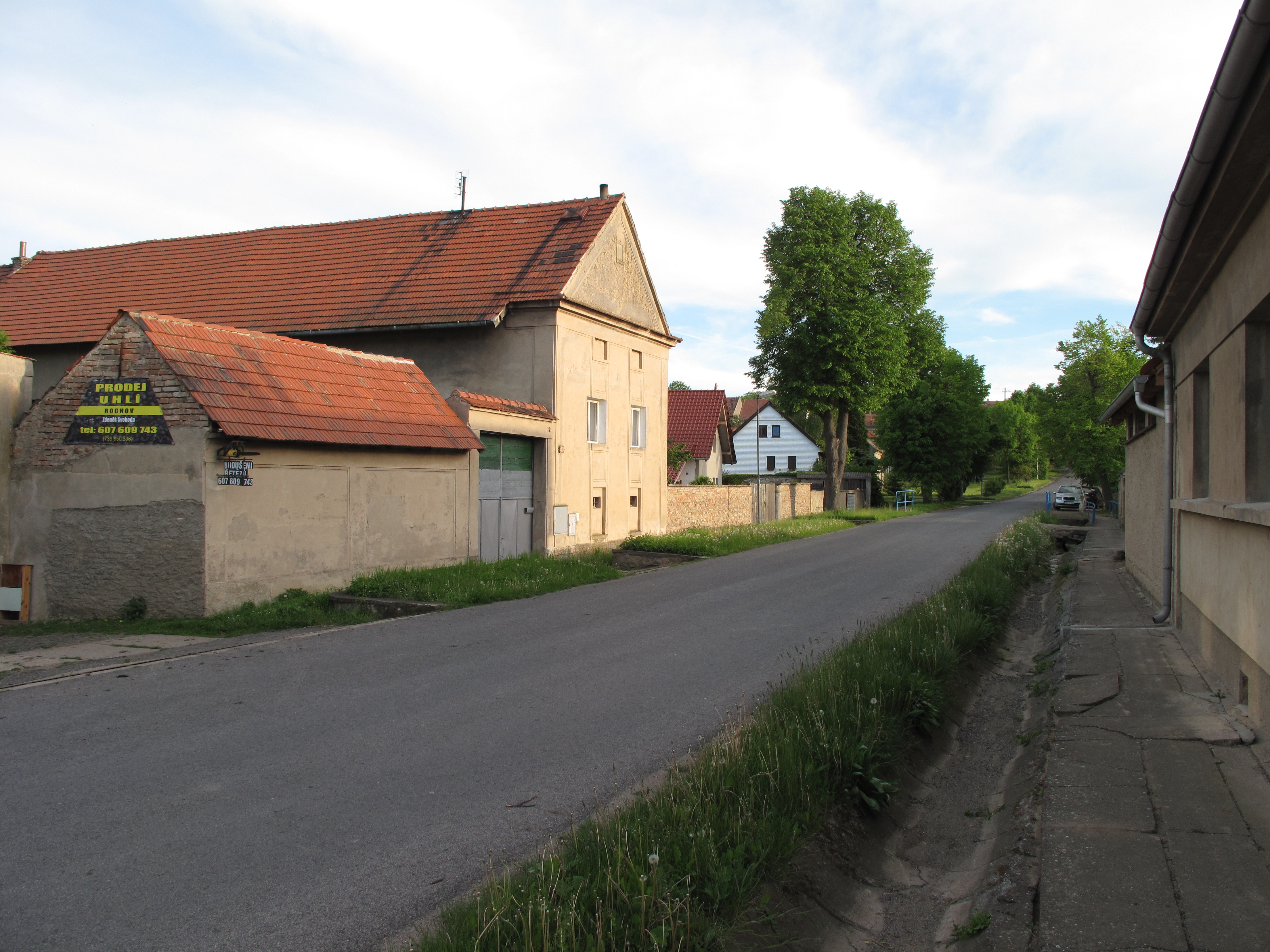 Ulice v Rochově. Okres Litoměřice, Česká republika.